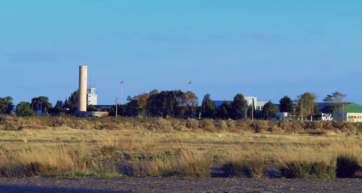 Aeropuerto de Trelew